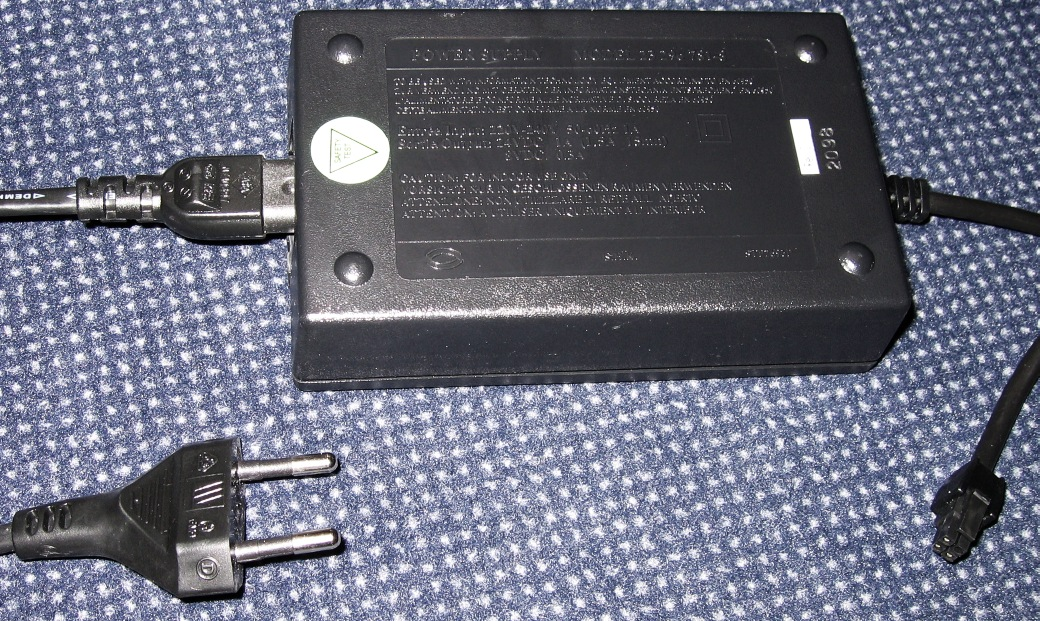 Kleinleistungsnetzteil 230V einphasig auf 8V/0,3A und 24V 1A in Standalone Bauweise. Euro-Stromkabel, Schutzklasse II. Genehmigung: siehe unten